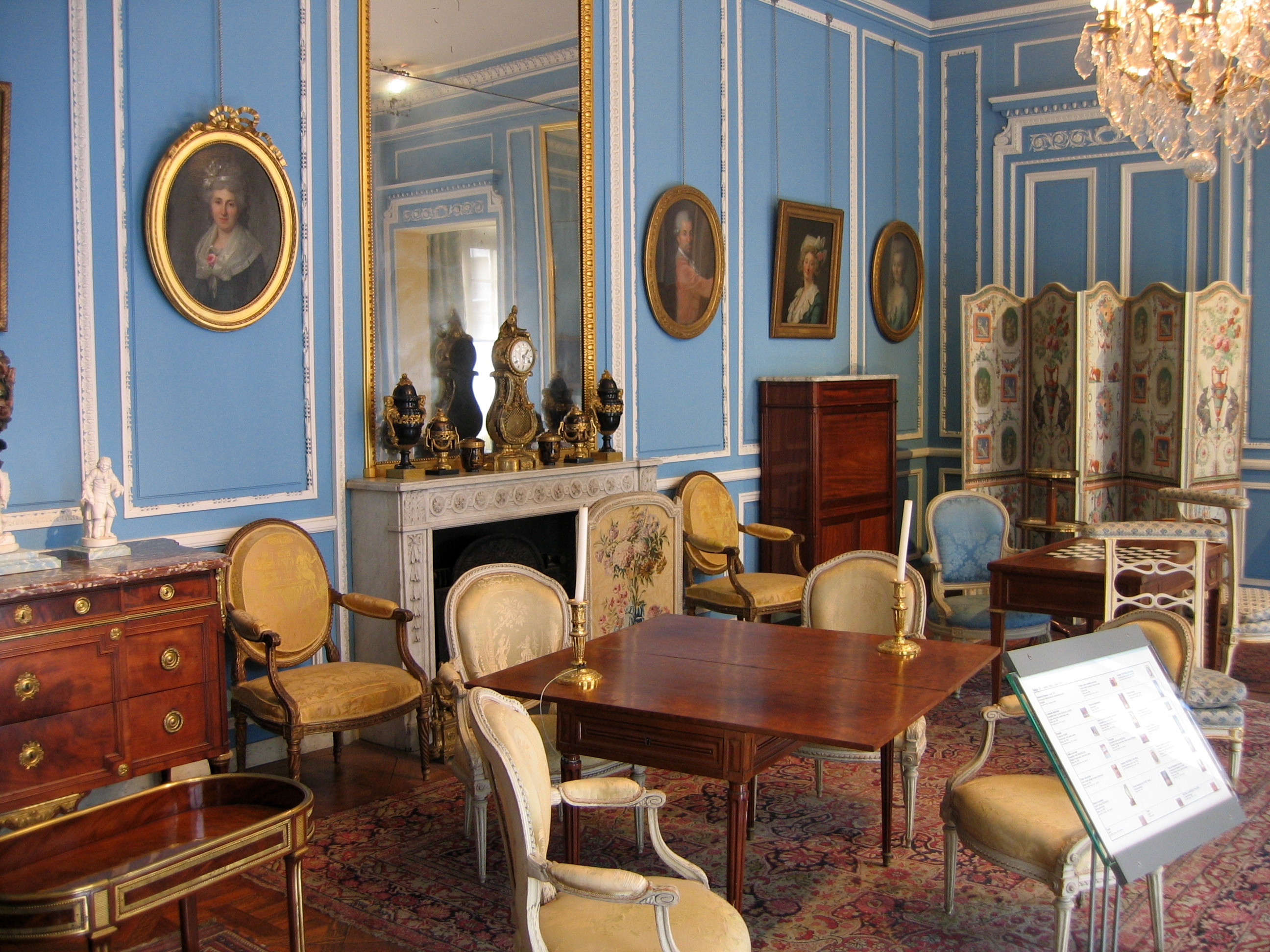 Le musée Carnavalet à Paris, ce dernier retrace l'histoire de la ville de Paris (salle 53, salon bleu Louis XVI)